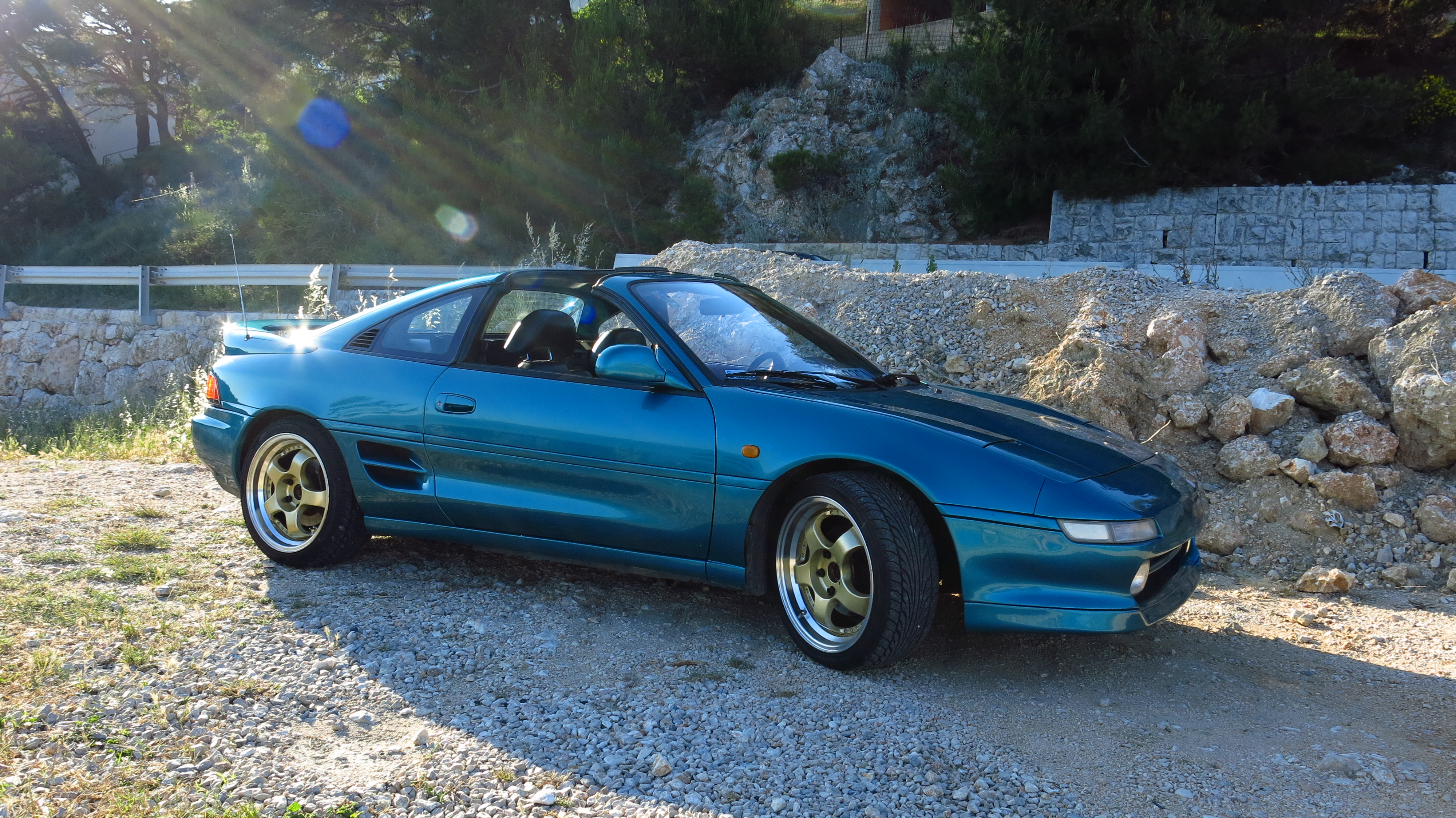 MR2 SW20